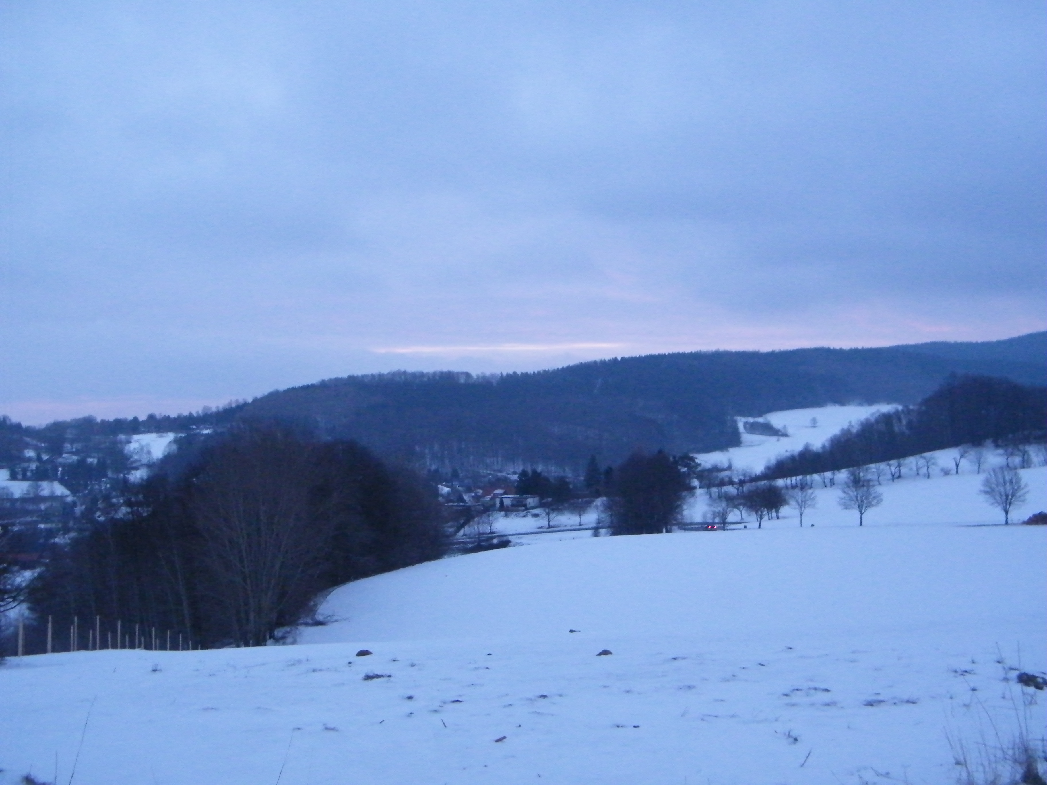 Vlevo Buchberg, uprostřed Kaiserberg, vpravo svahy Tanečnice, pohled od Hinterhermsdorfu